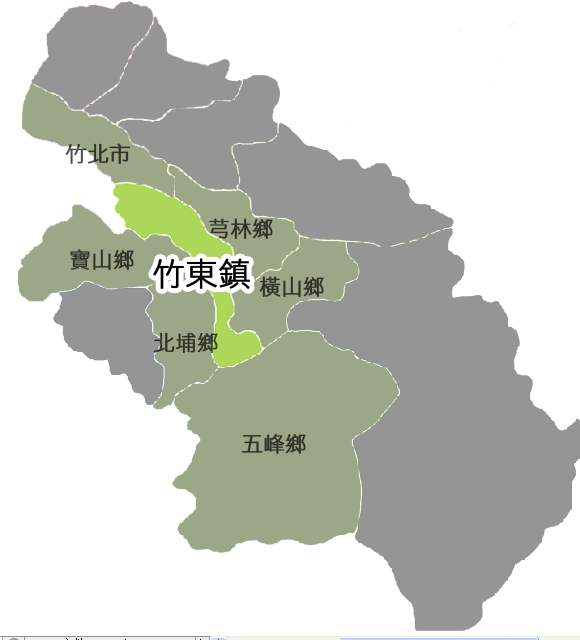 竹東鎮相對位置。